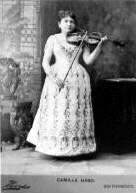 Camille Urso posant avec son violon. (Cliché photographique circa 1860/1870).